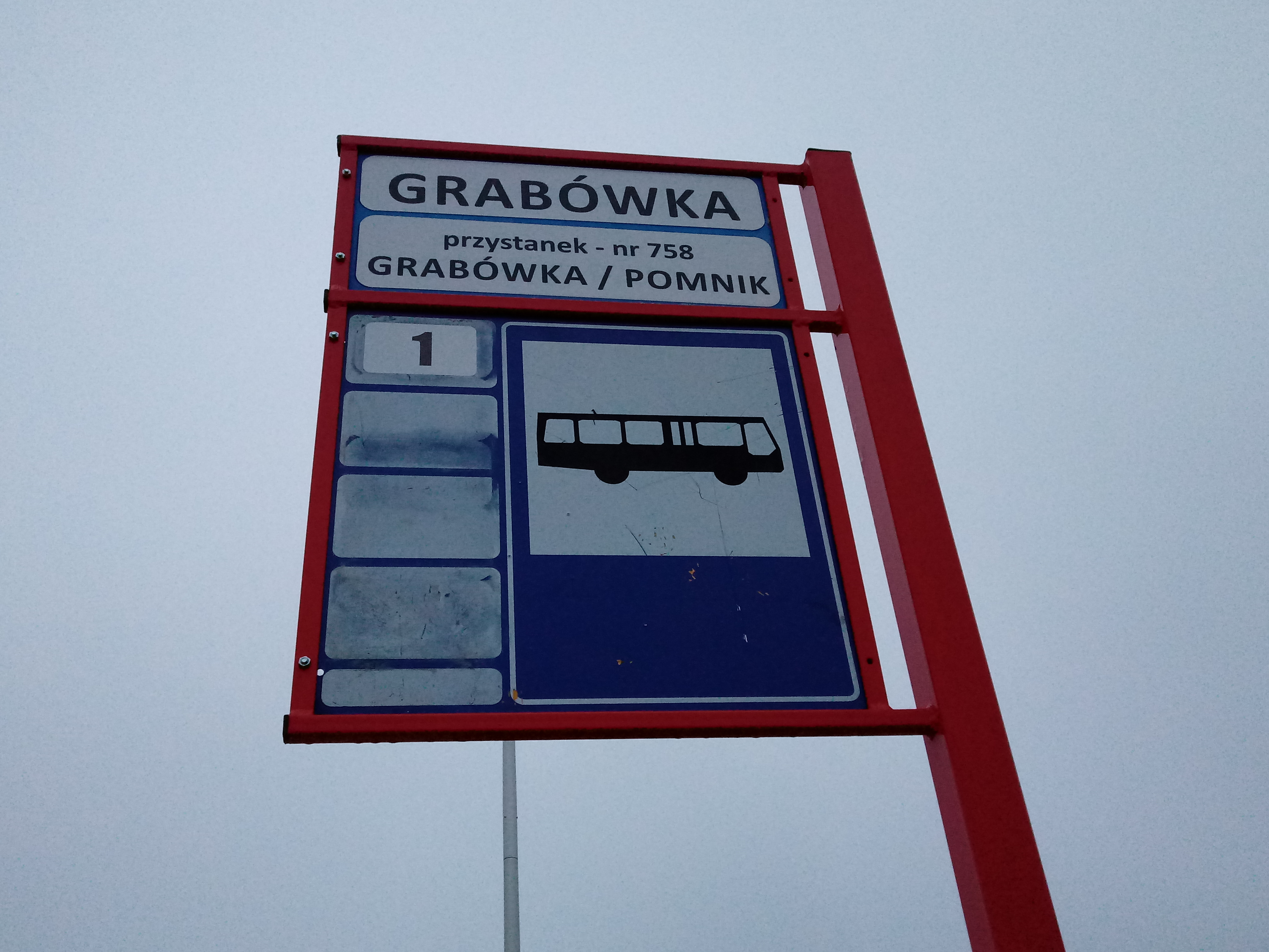 Przystanek końcowy 1 - MPK Białystok - nr. 758 Grabówka- Pomnik.